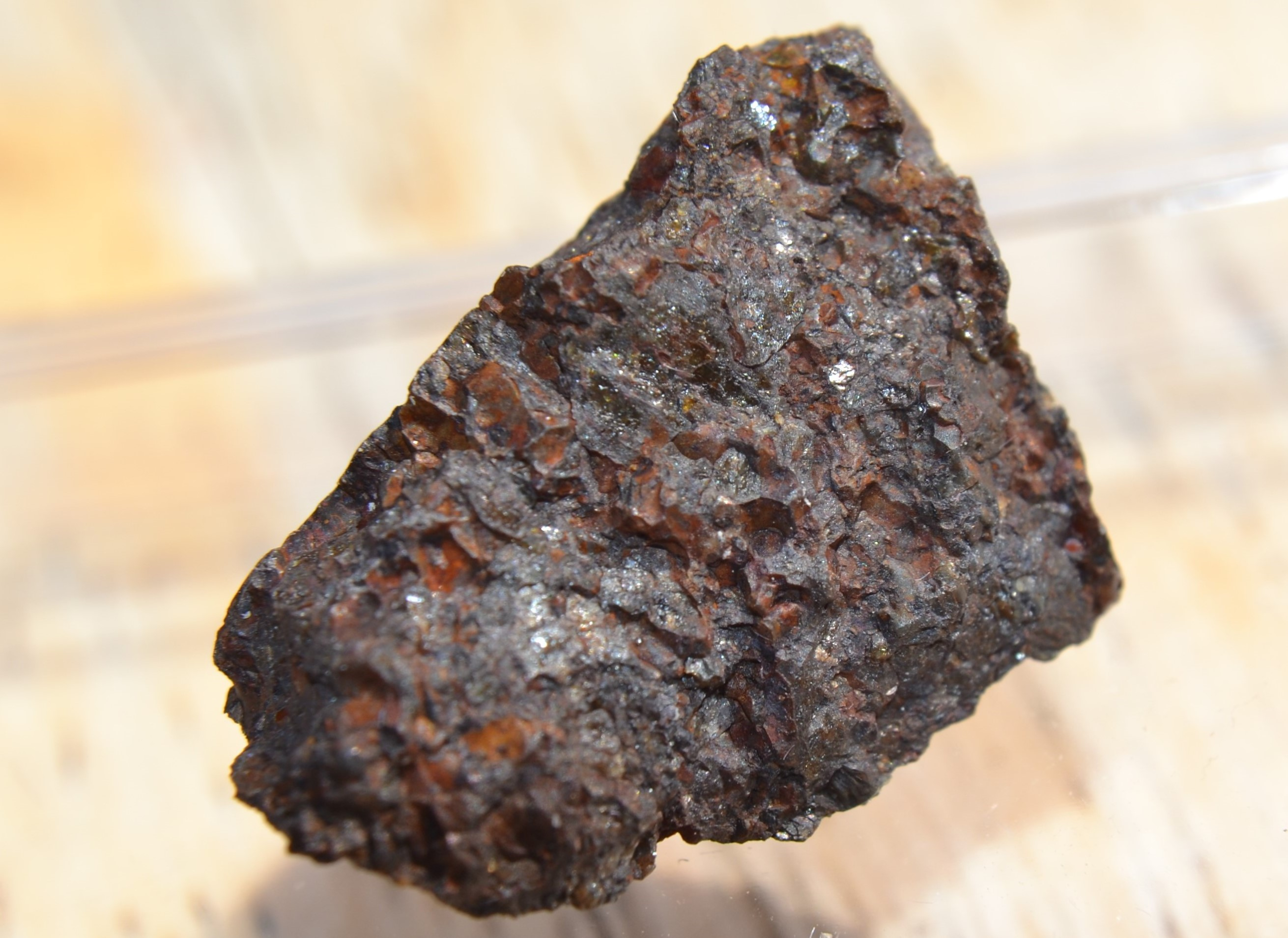 Ureilit 3,250 gr. NWA2625